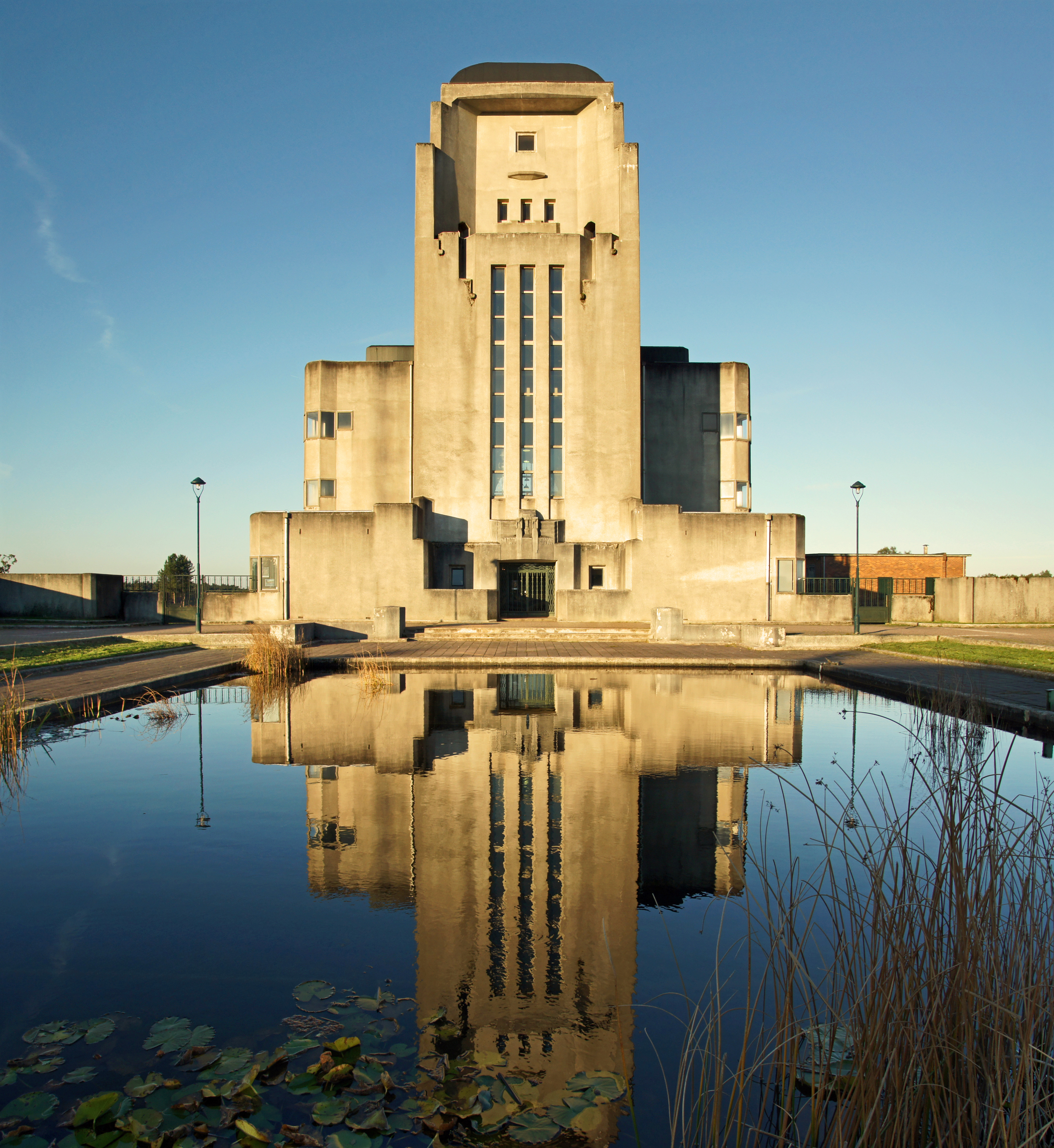 Radio Kootwijk, Gebouw A: "de Kathedraal"